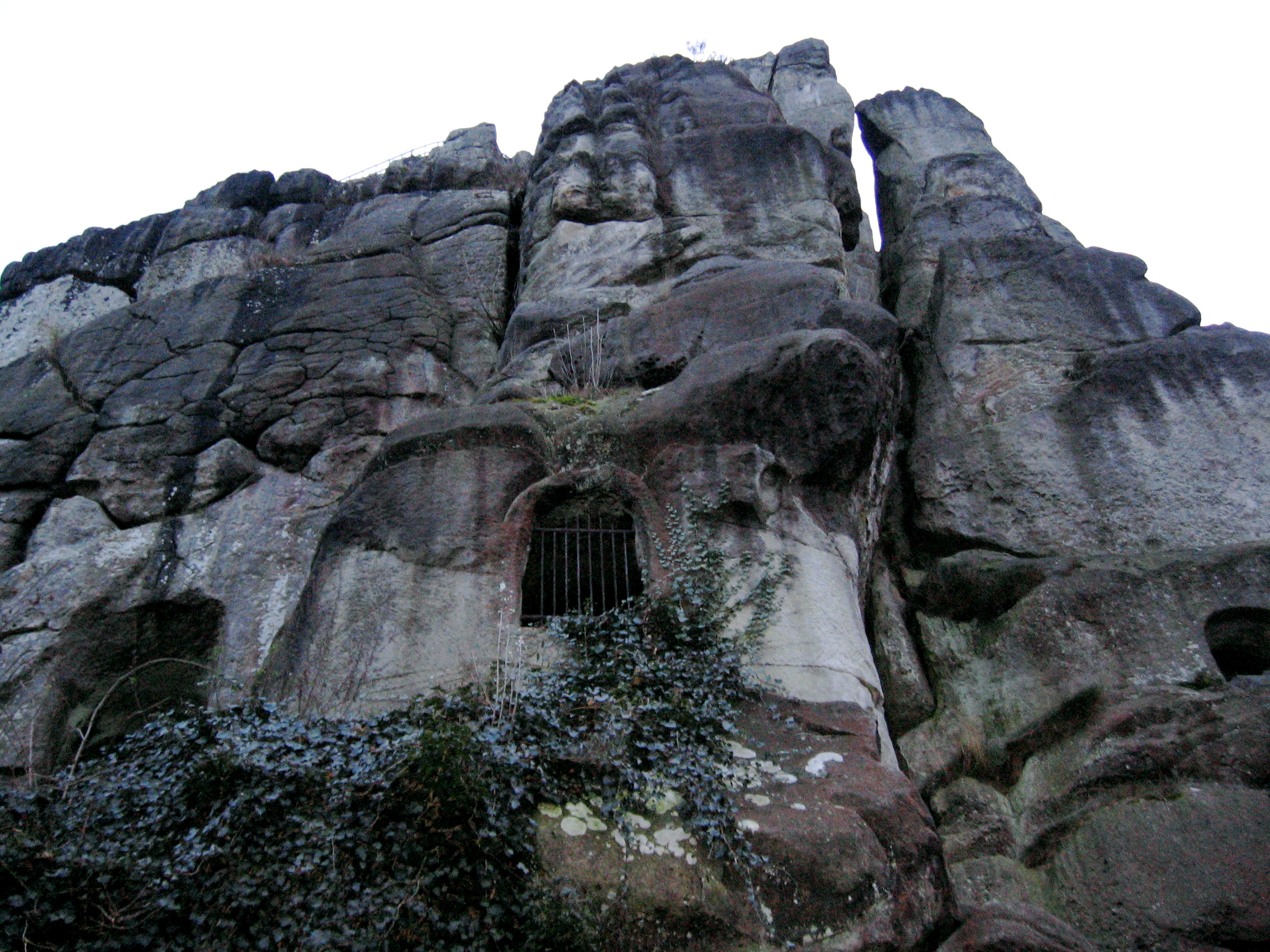 Externsteine, Grottenöffnungen von schräg unten